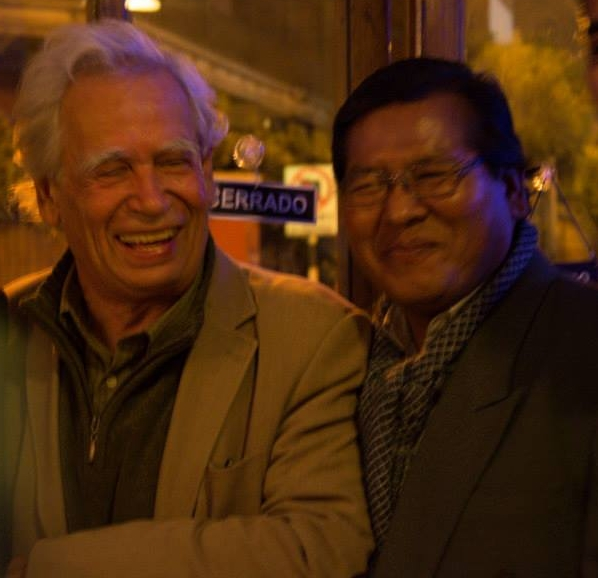 Después de un recital de poesía en Barranco Lima 2013